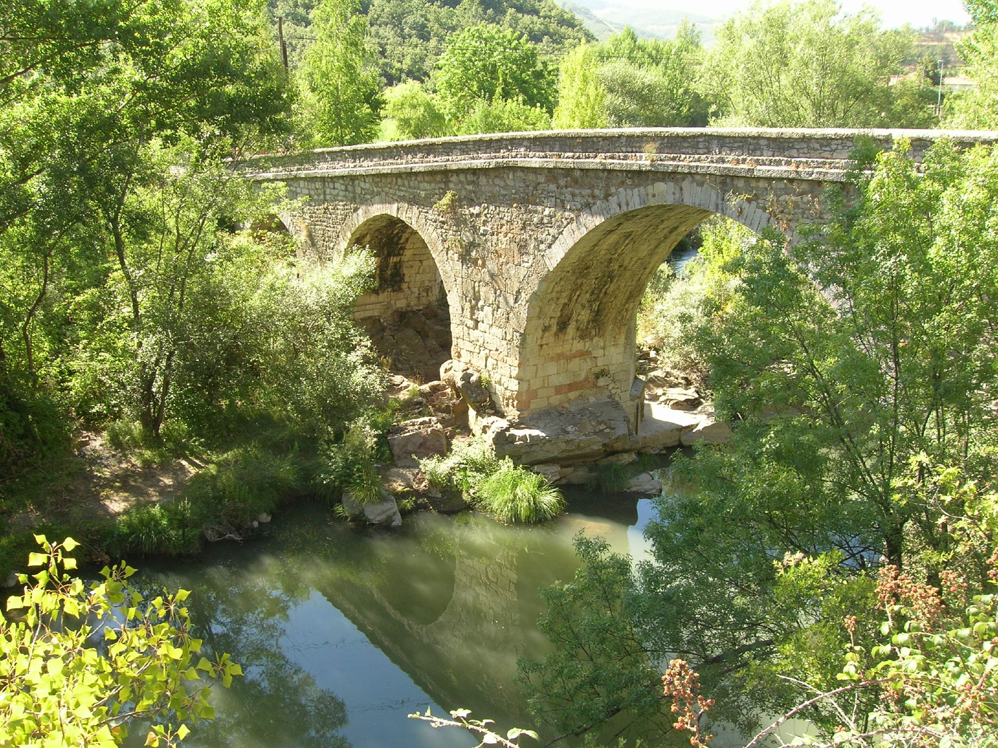 Puente de Alba.